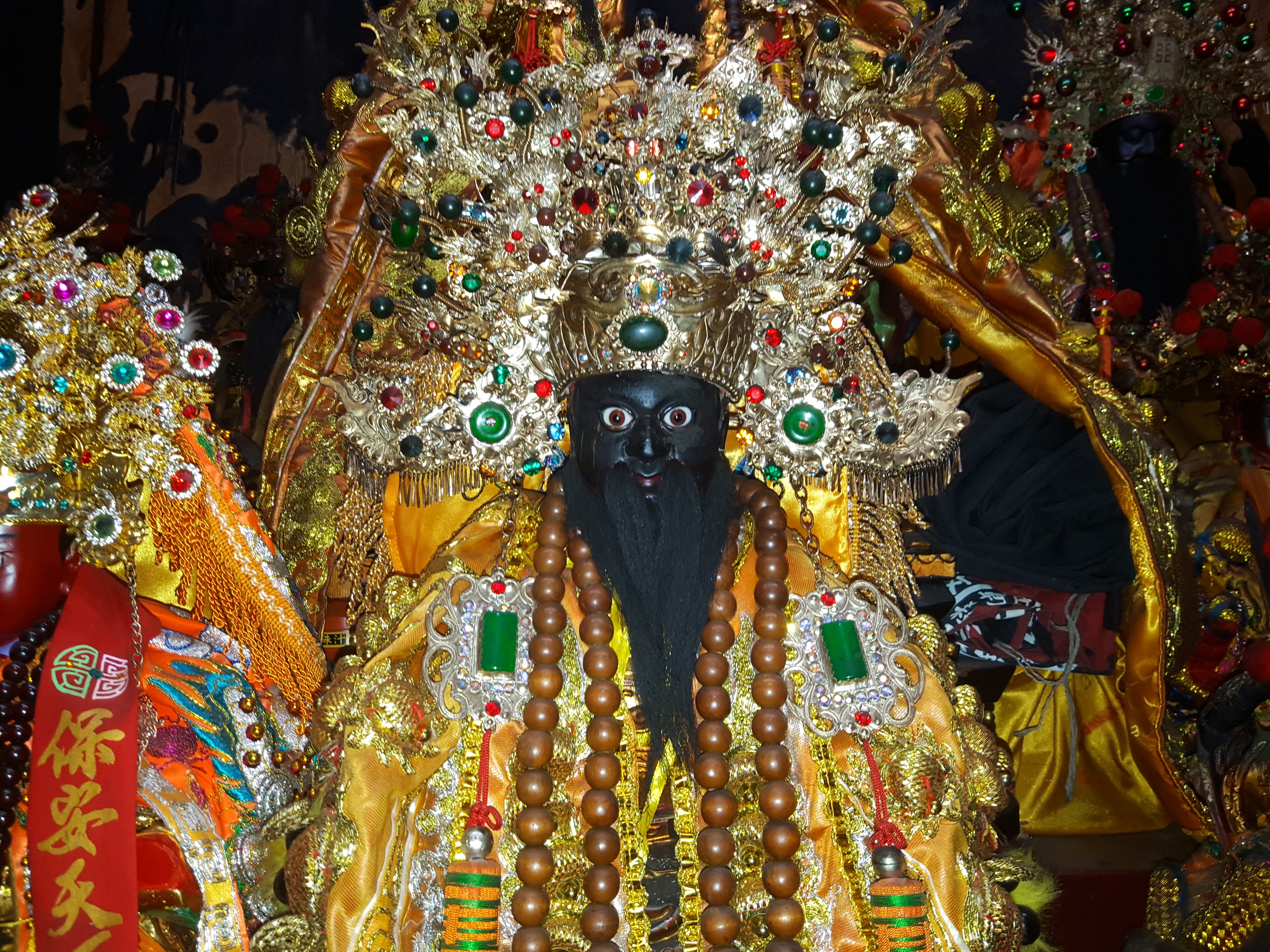 中文（台灣）: 港東聚福宮封府千歲神尊